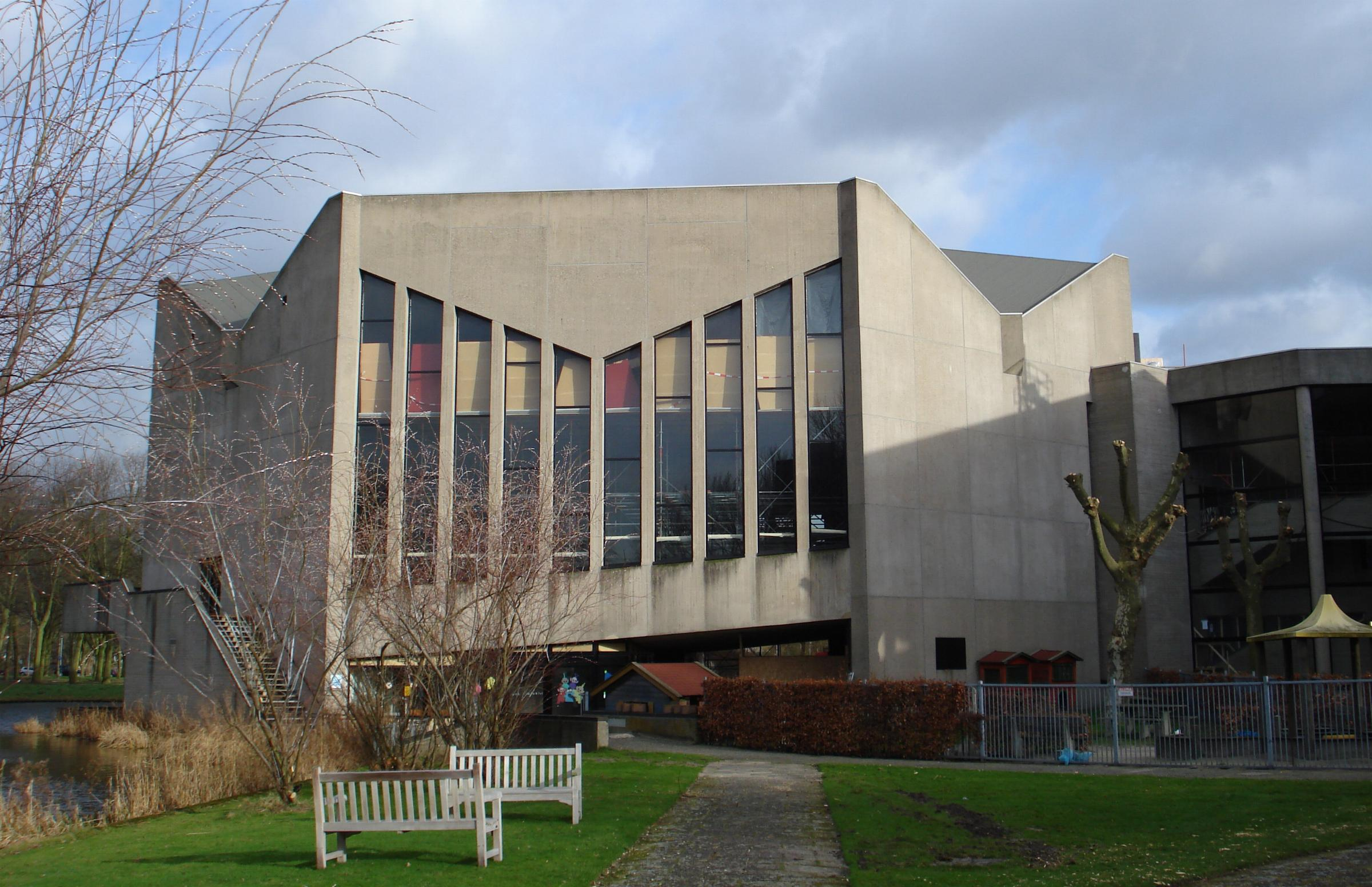 Rotterdam. Erasmus universiteit: Aula. Gemeentemonument. Architecten: Cornelis Elffers en A. van der Heyden.